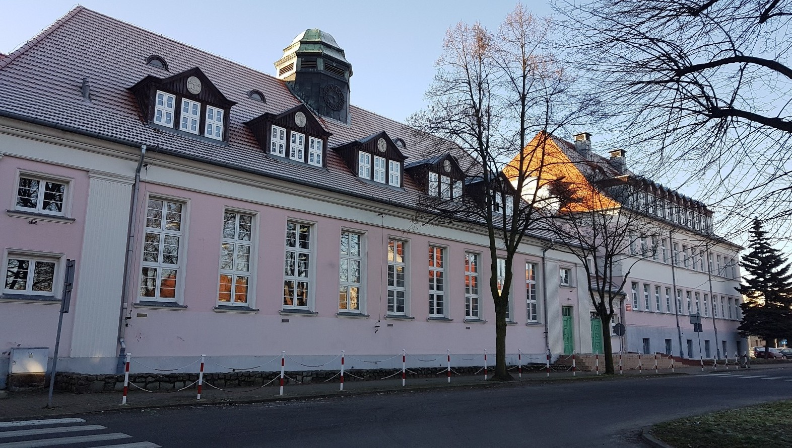 Miejsce byłego Liceum Pedagogicznego